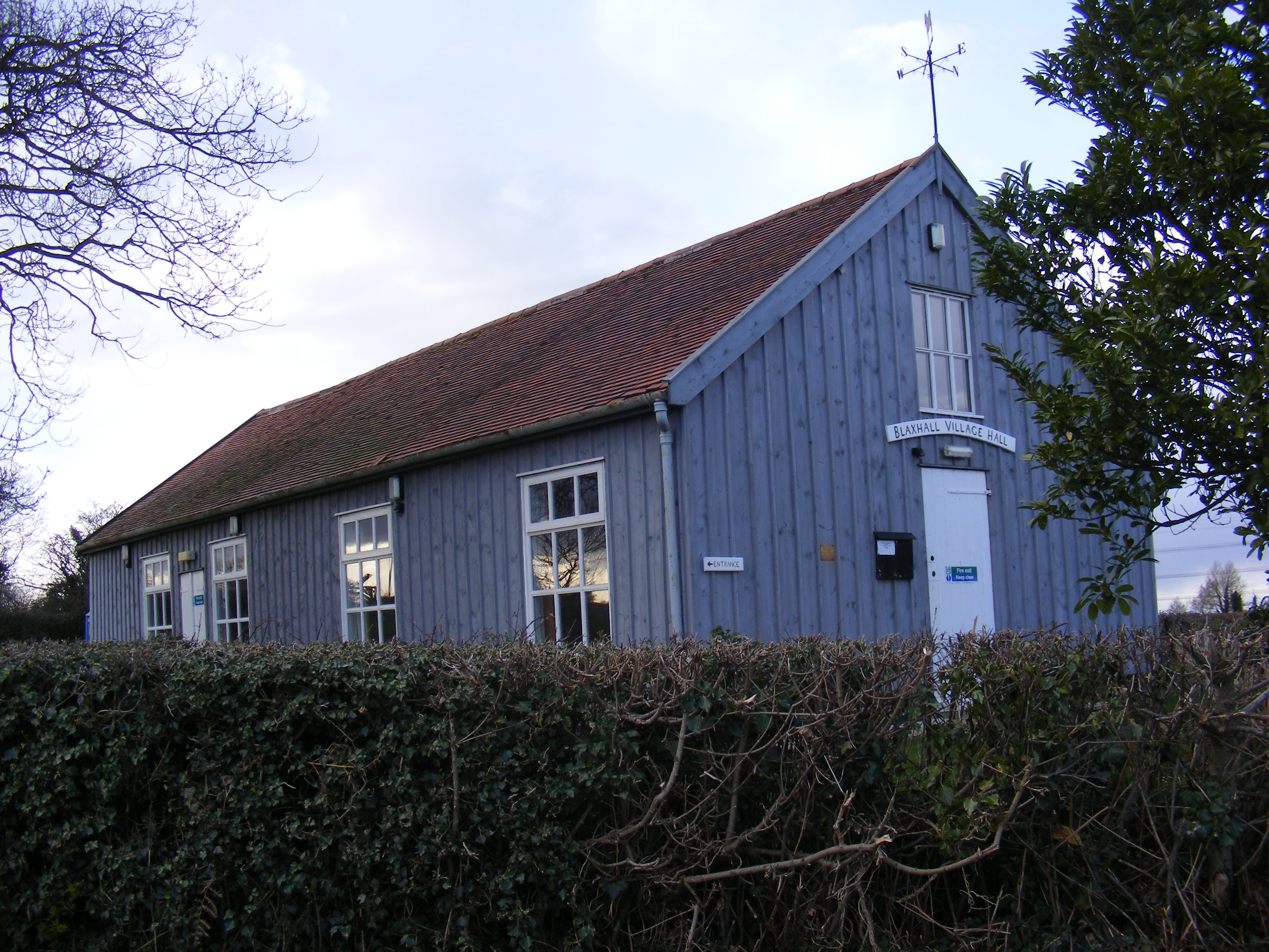 Blaxhall Village Hall